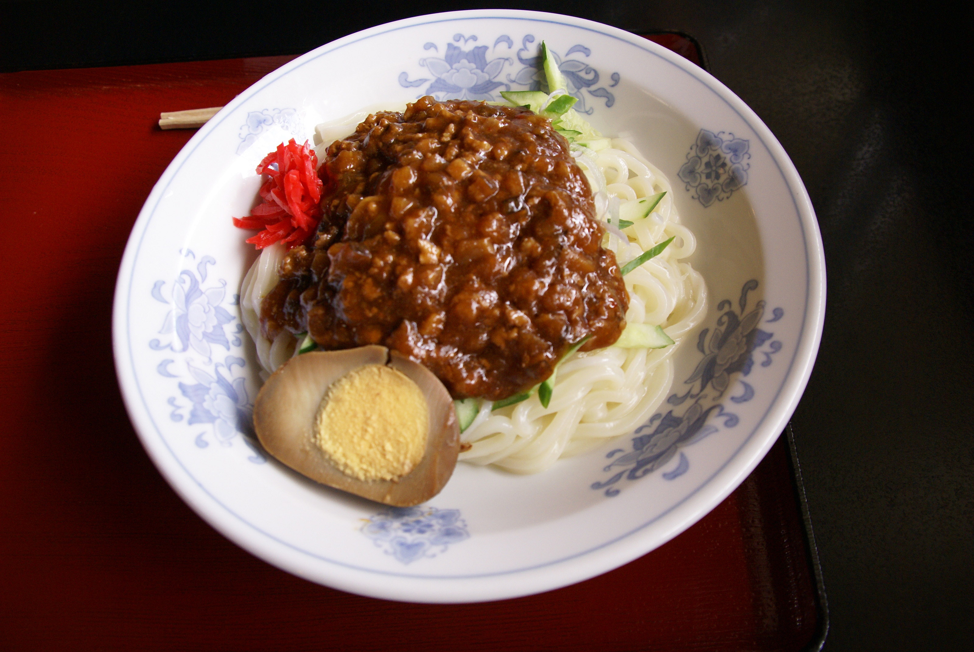 Jaja-men at Hanamaki, Iwate prefecture, Japan